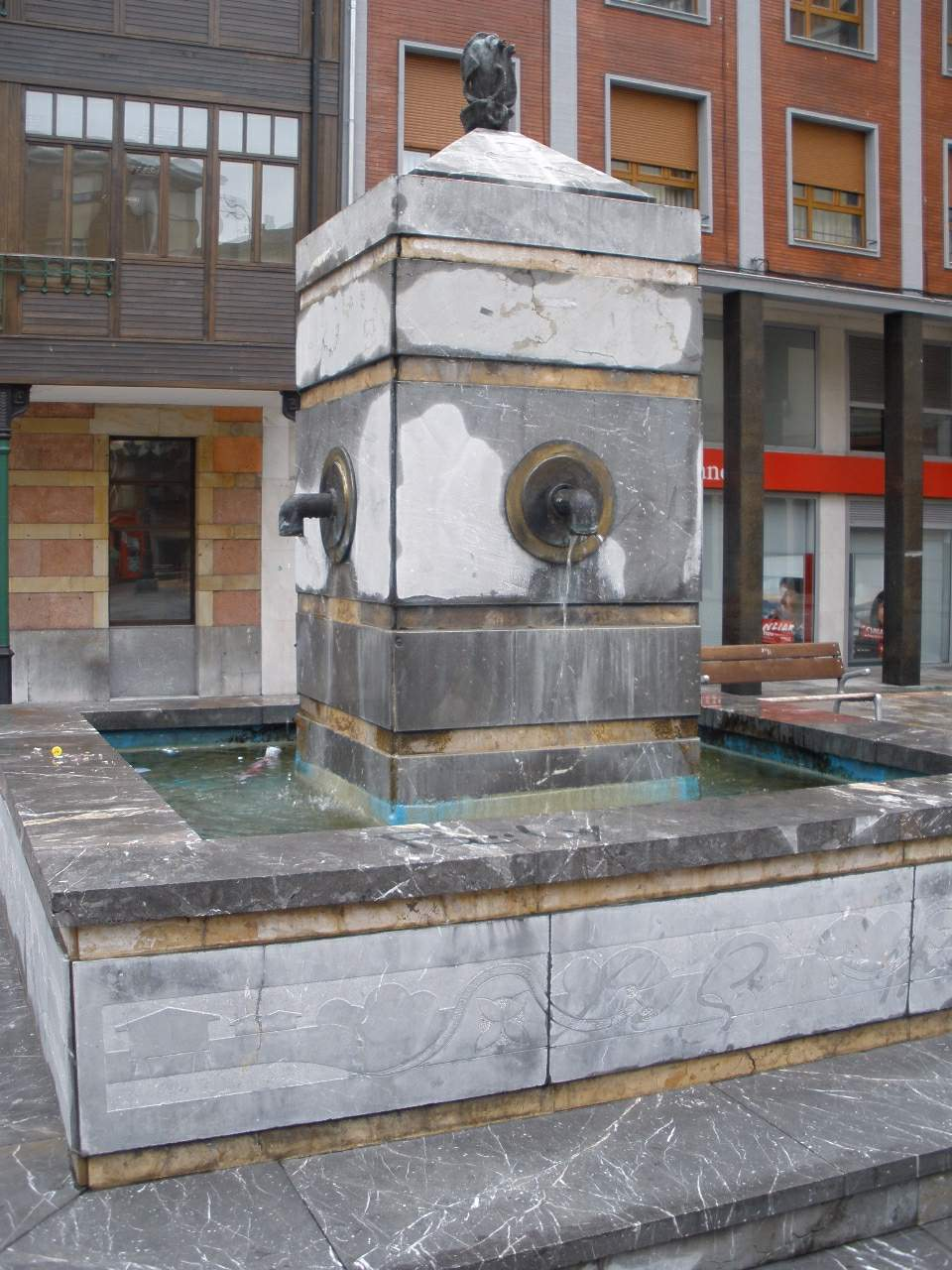 Paisaje urbano de Sama de Langreo (Asturias)